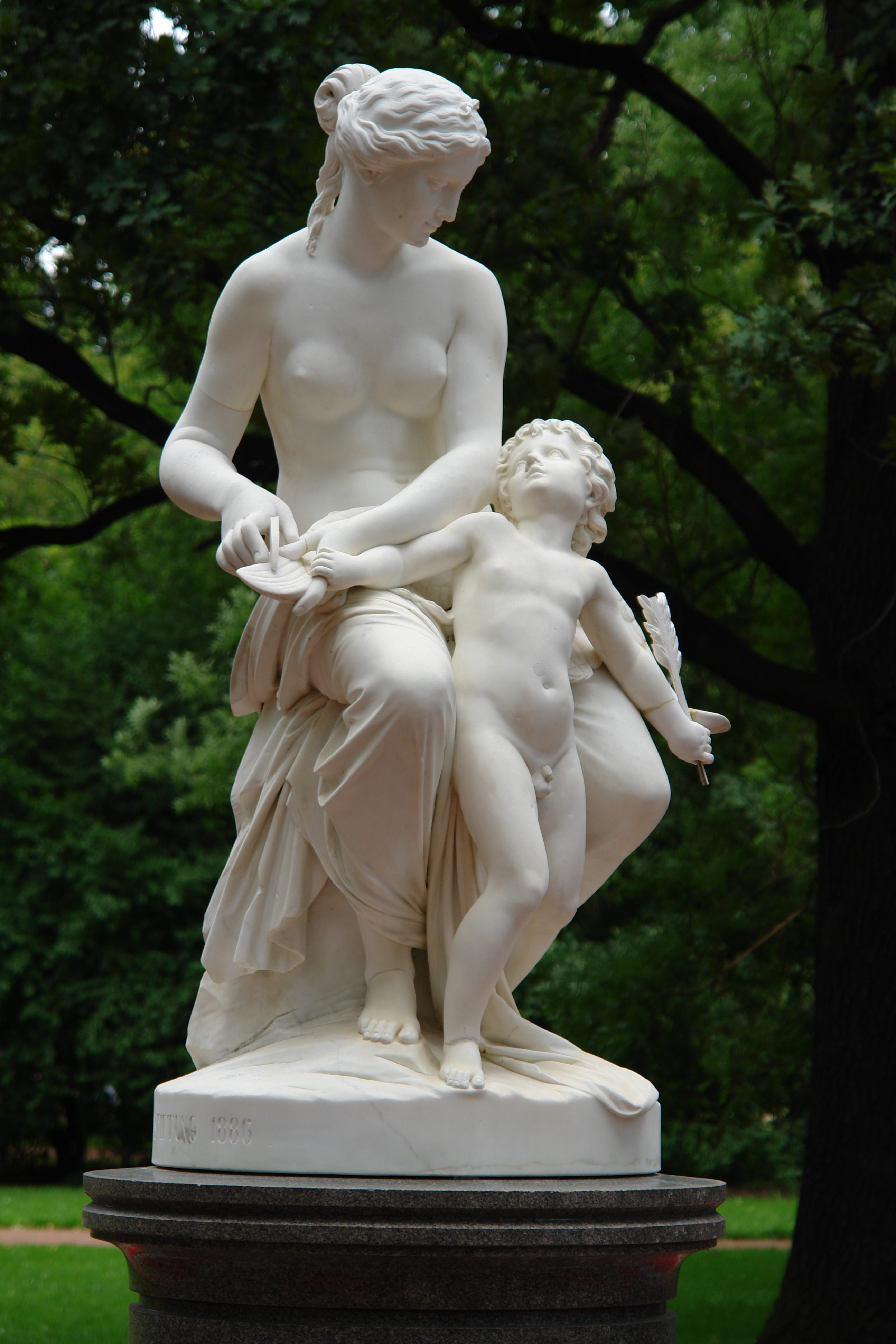 "Venus, Amor die Flügel beschneidend" von Theodor Heinrich Bäumer, 1886